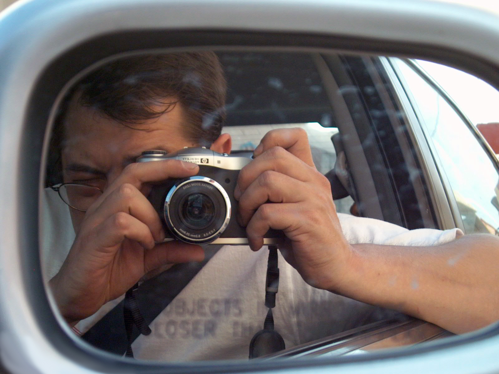 Autoretrato en el retrovisor del automóvil